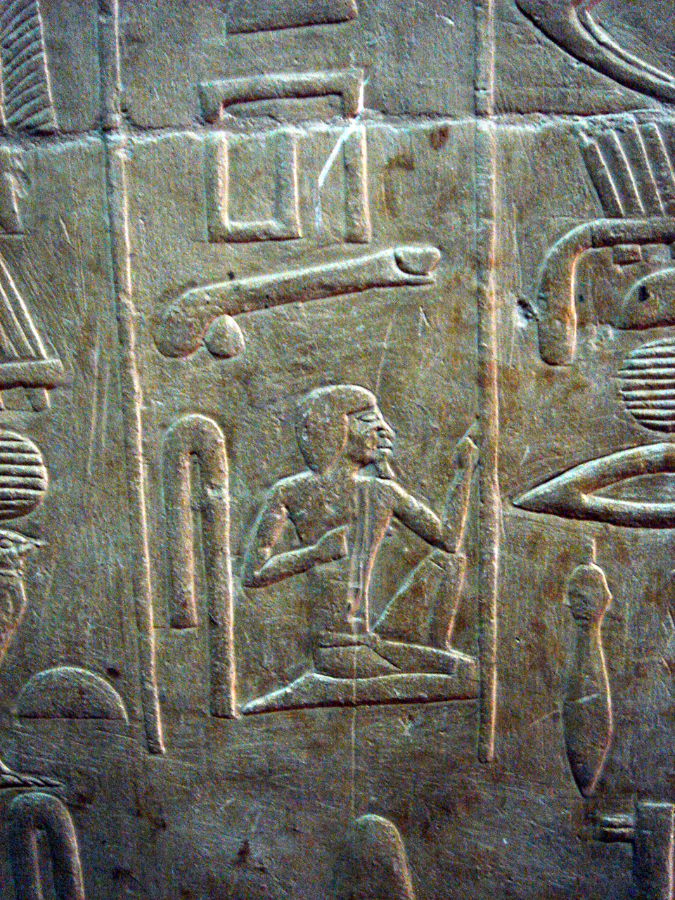 Mastaba de Ti en Saqqara (Egipto). Jeroglíficos, entre los cuales el que tiene forma de falo.